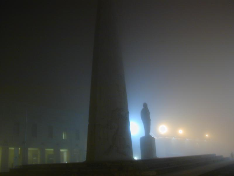 Lugo di Romagna, Italia - Monumento a Francesco Baracca